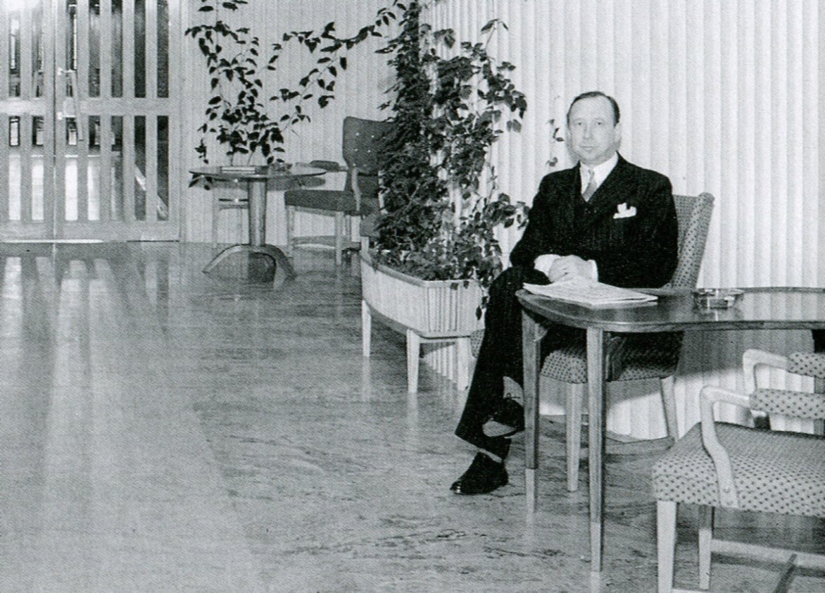 Arkitekt Ture Wennerholm i direktörsvåningen, LM Ericssons byggnad Telefonplan.